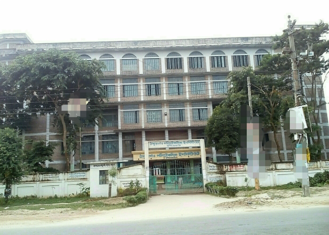 ঠাকুরগাঁও পলিটেকনিকের চিত্র